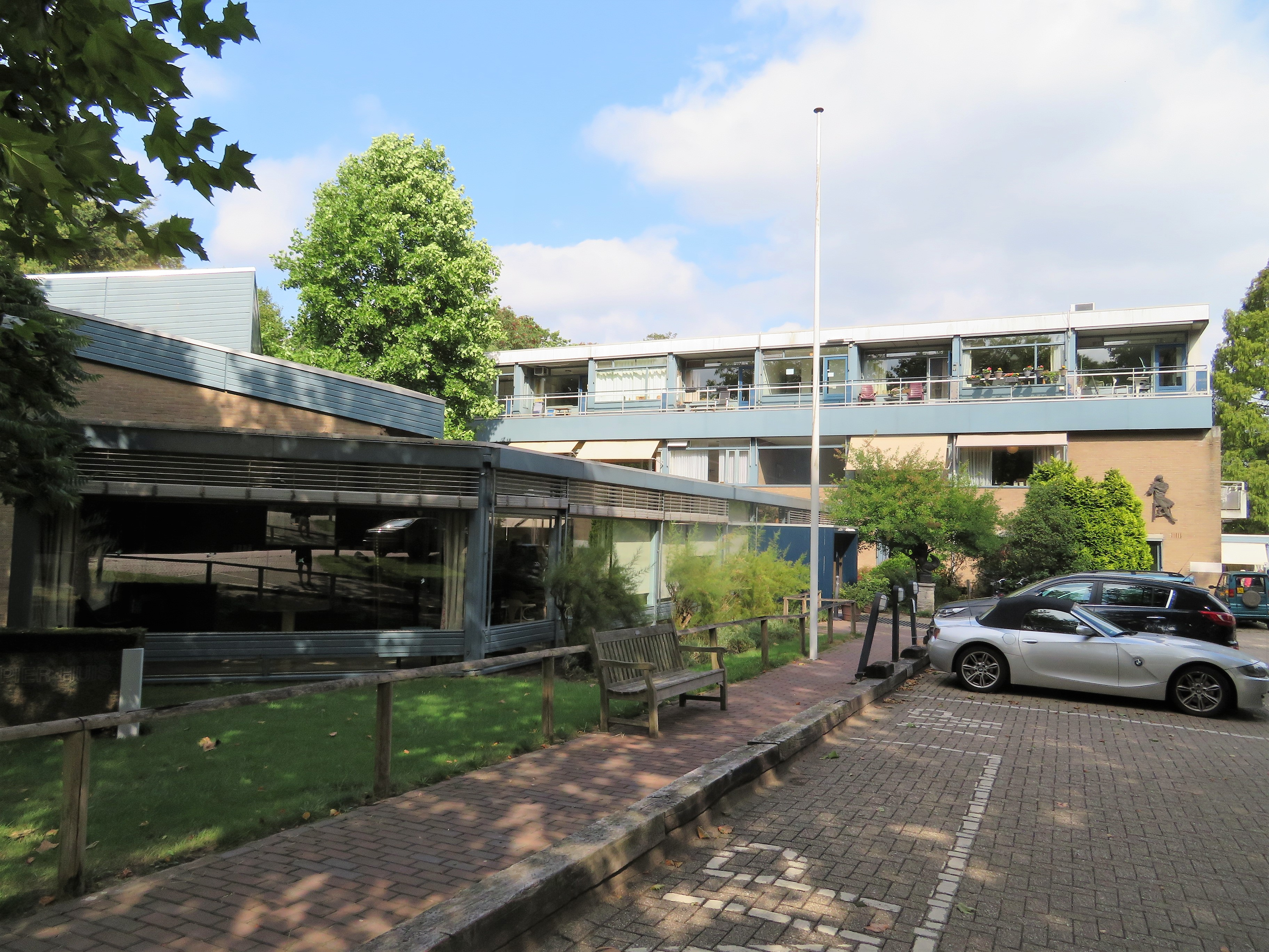 Rosa Spier Huis, wooncentrum voor oudere kunstenaars en wetenschappers in Laren, Noord- Holland